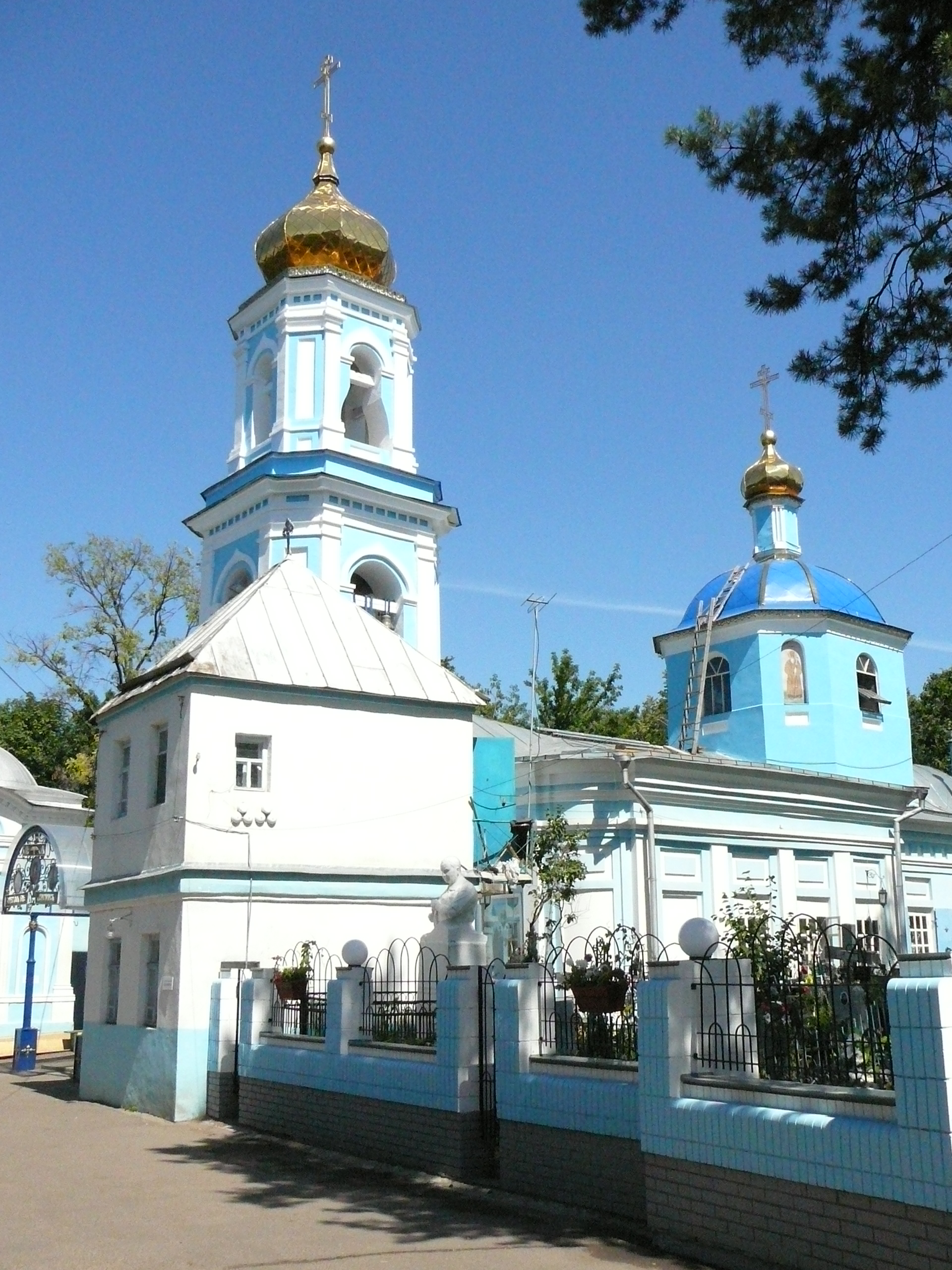 Церковь Ярославских Чудотворцев (Республика Татарстан, Казань, Арское кладбище)